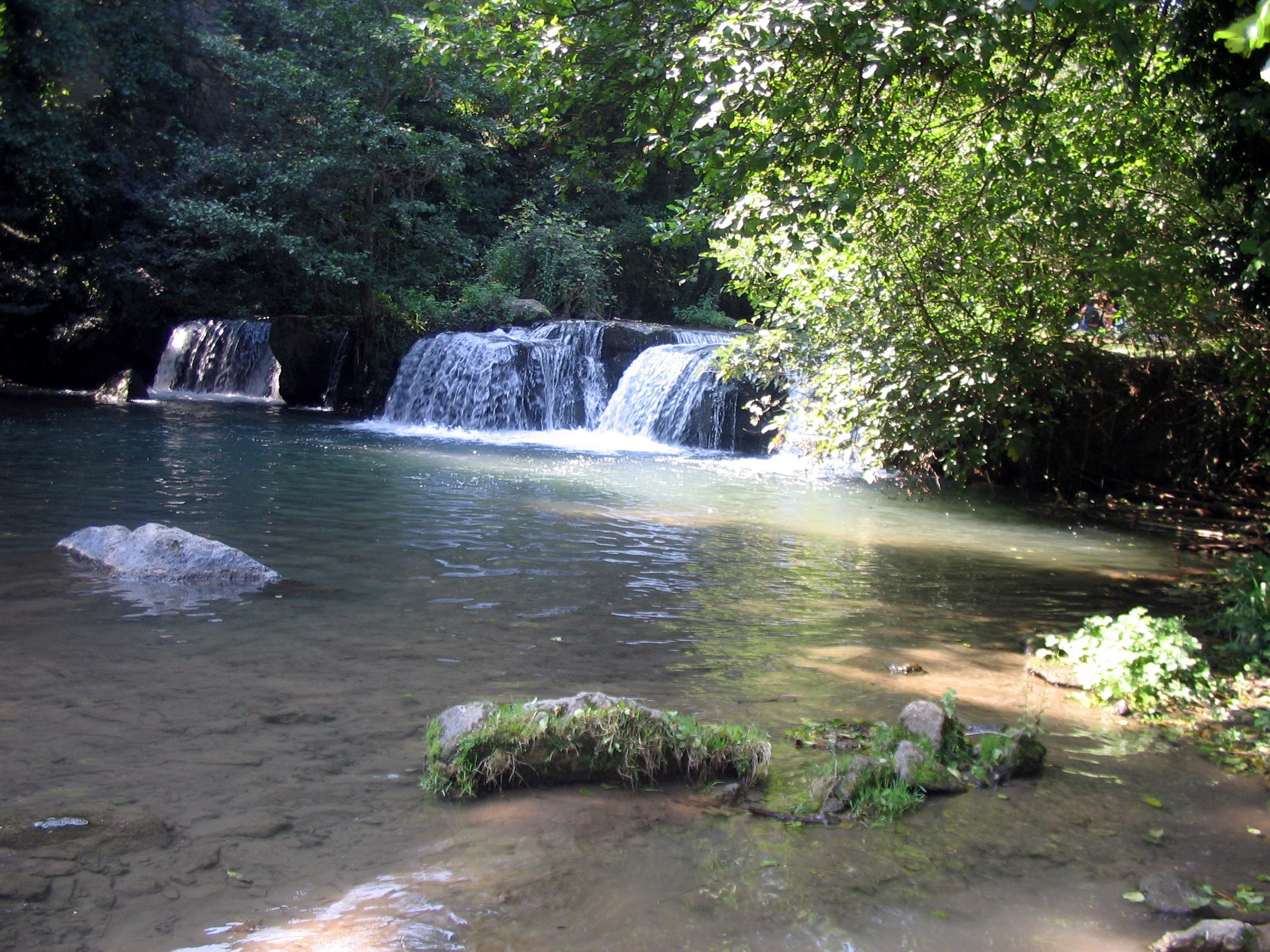 Fiume Treja, Lazio, Italia